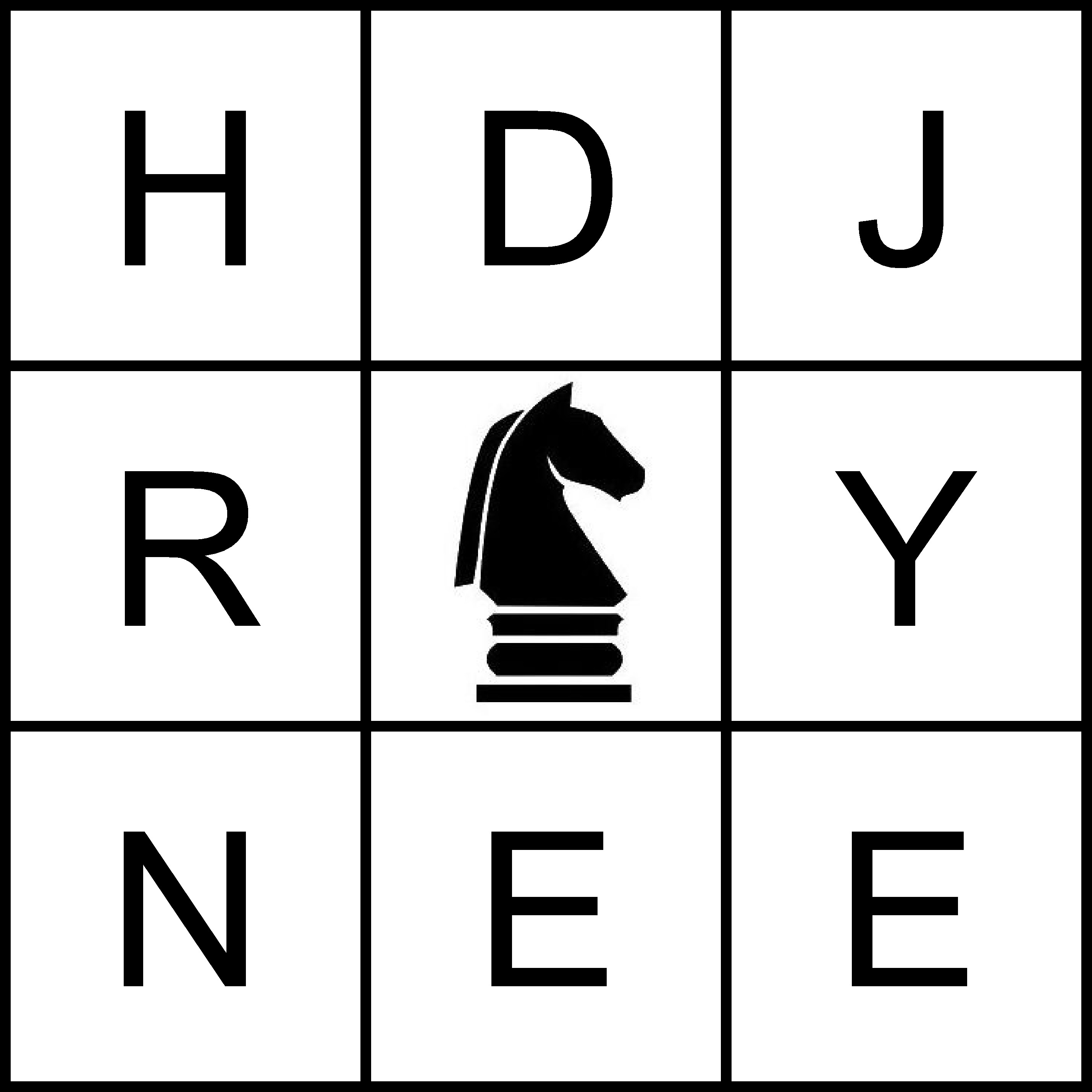 Oplossing: HYNDERJE